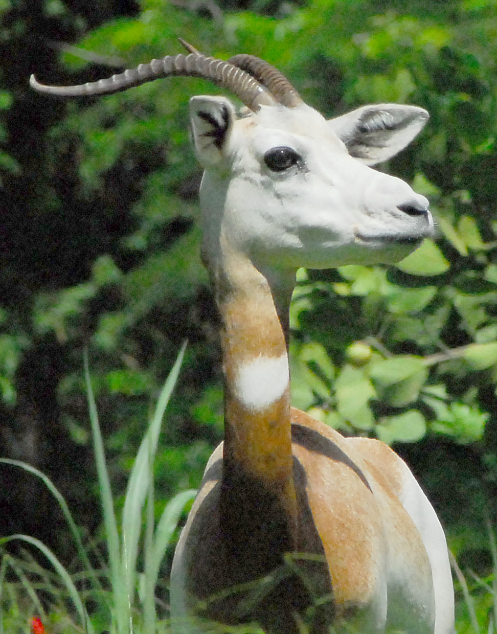 Gazella dama at Honolulu Zoo